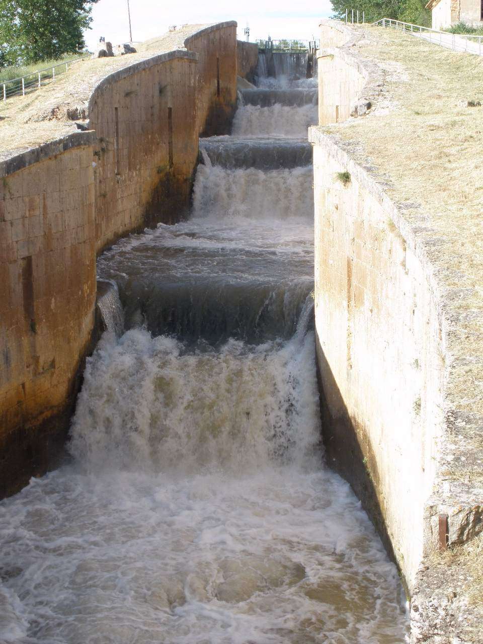 Canal de Castilla a su paso por Frómista (Palencia)